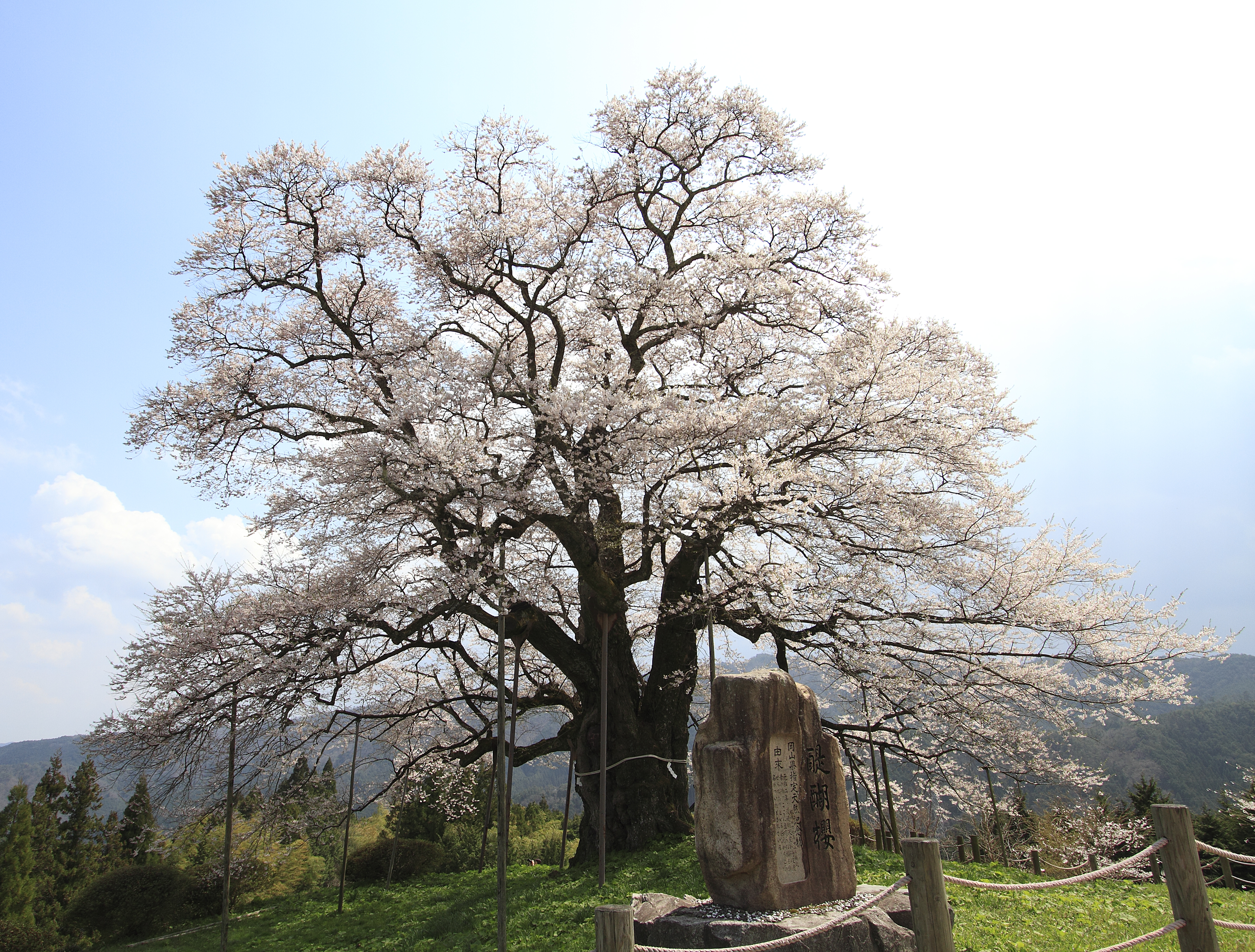 醍醐桜 （岡山県真庭市）